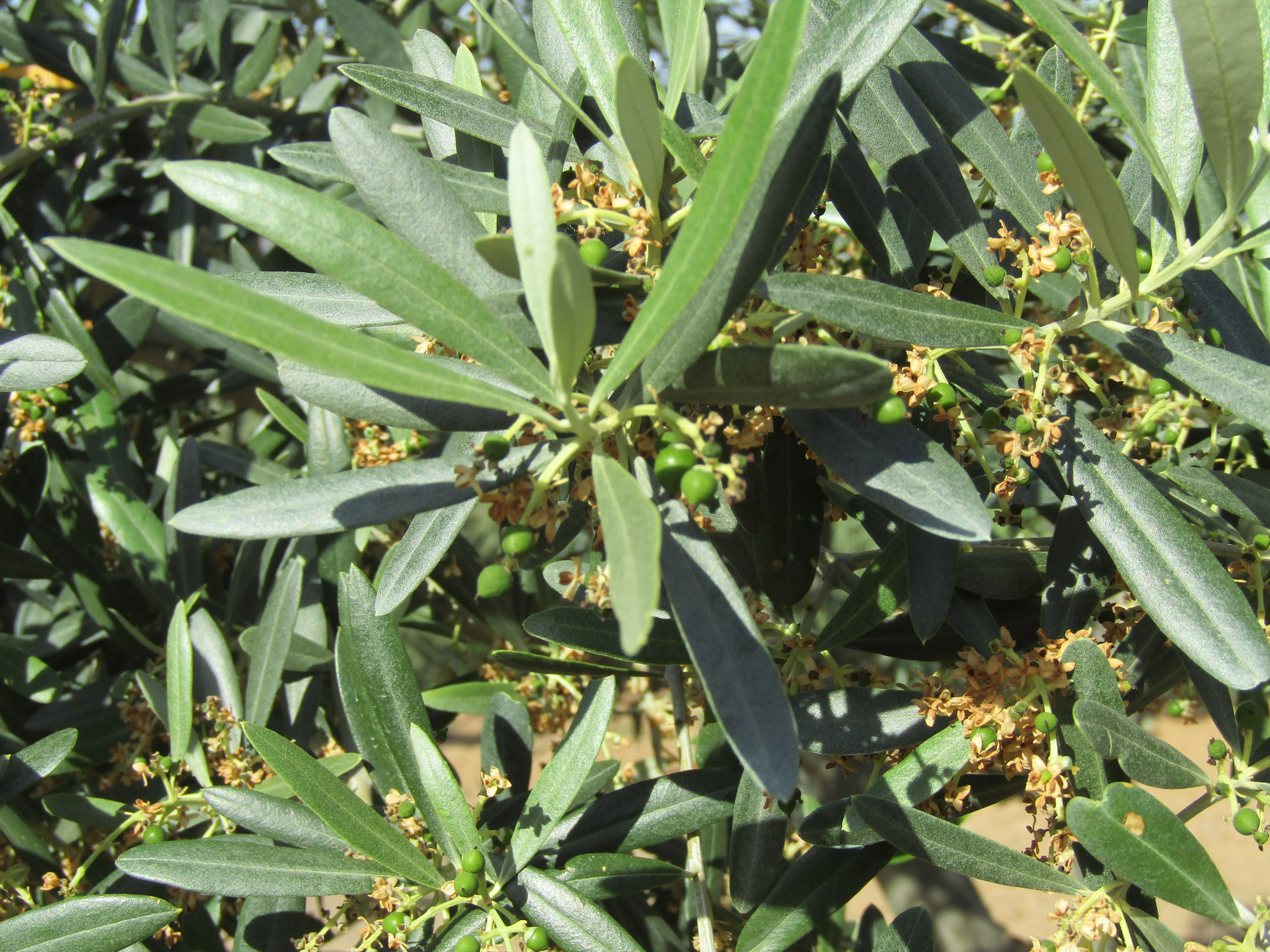 Detall d'olives incipients de la varietat palomar a una vinya d'Olesa de Montserrat (Barcelona).